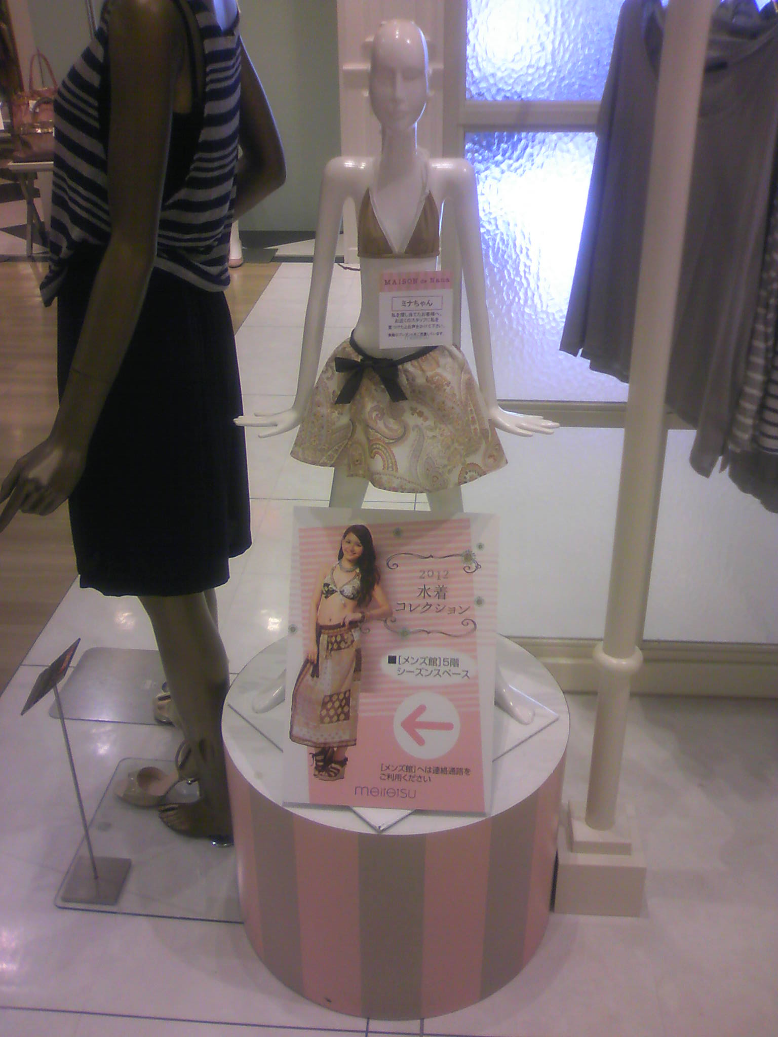 名鉄百貨店本館「メゾン・ドゥ・ナナ」のマスコットキャラクターのミナちゃん